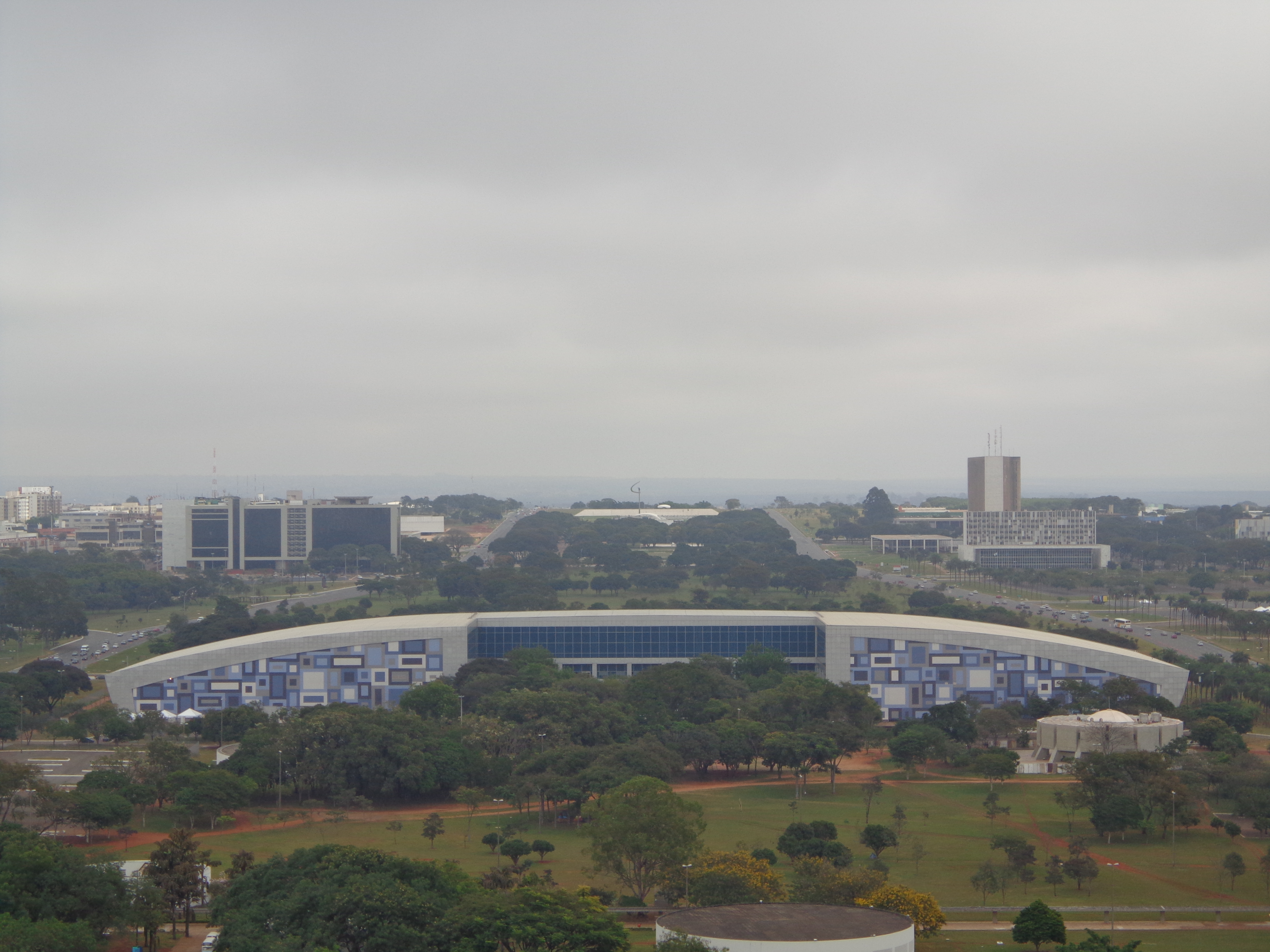 Brasilia DF Brasil - Centro de Convenções